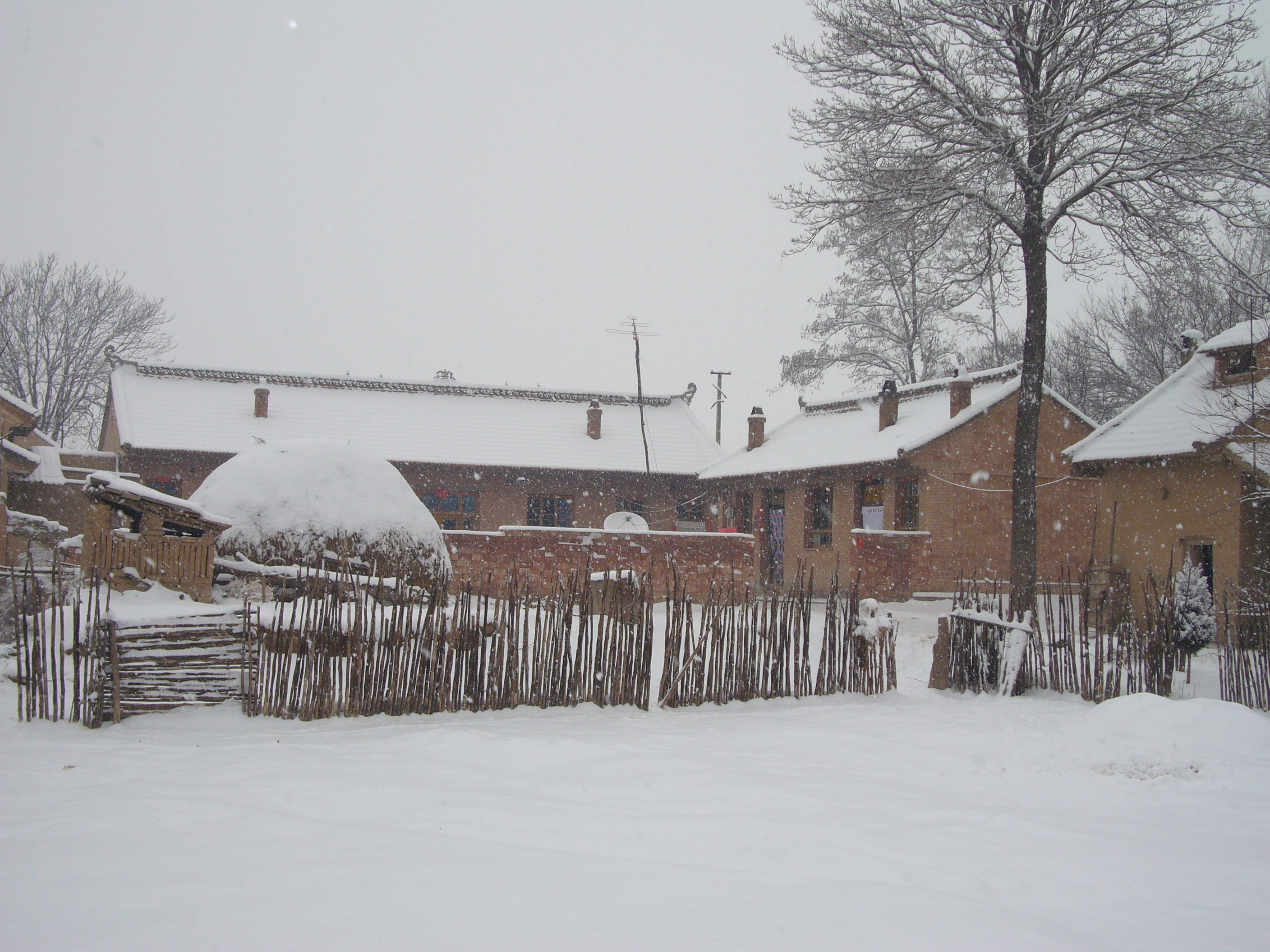 志斌原来的家（甘肃.正宁）